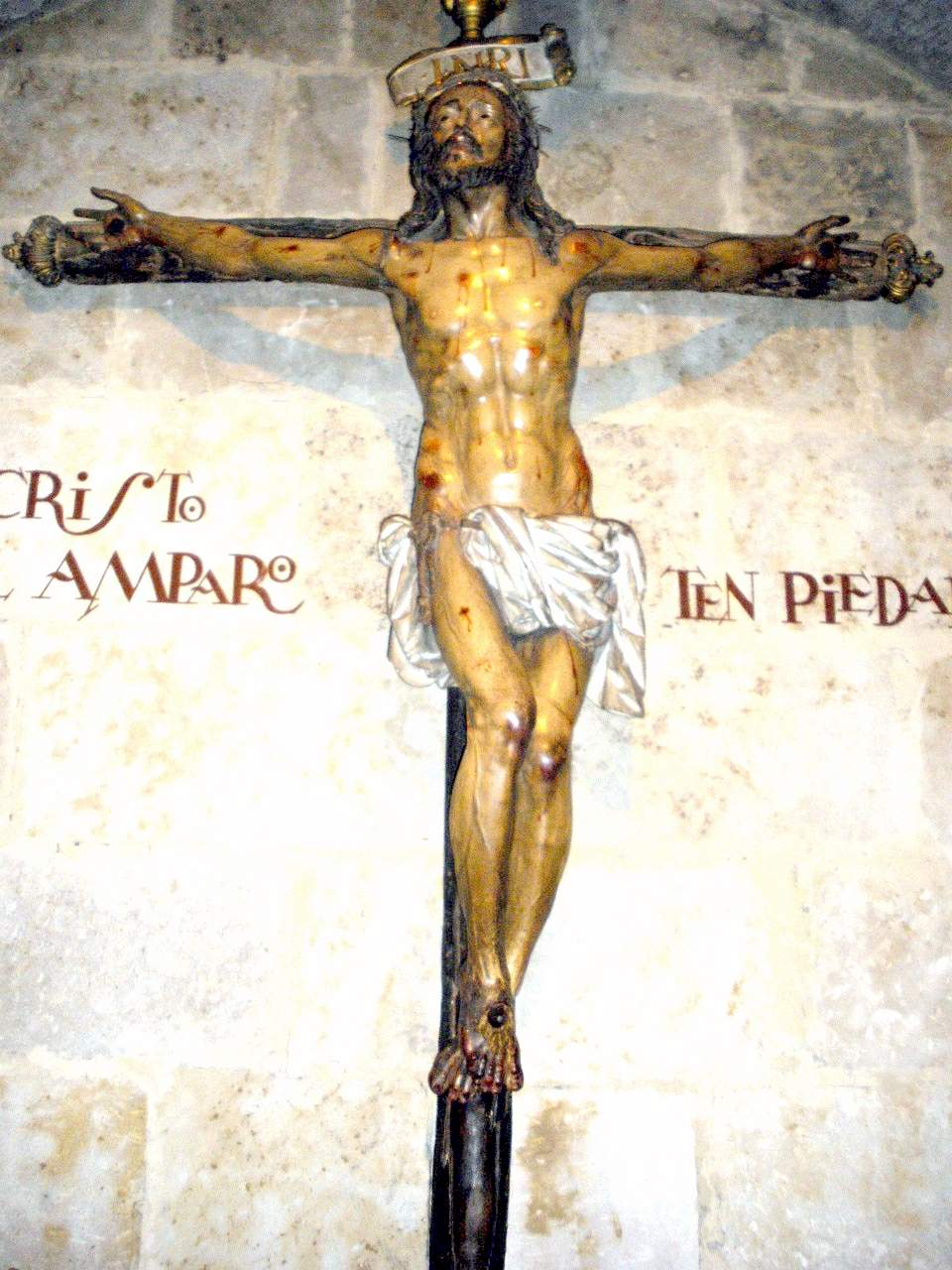 Iglesia de Nuestra Señora del Carmen (Salamanca)